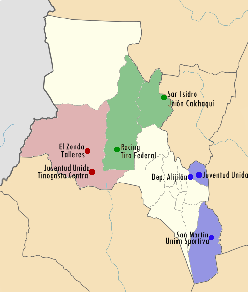 Mapa de la ubicación geográfica del Torneo Provincial 2019